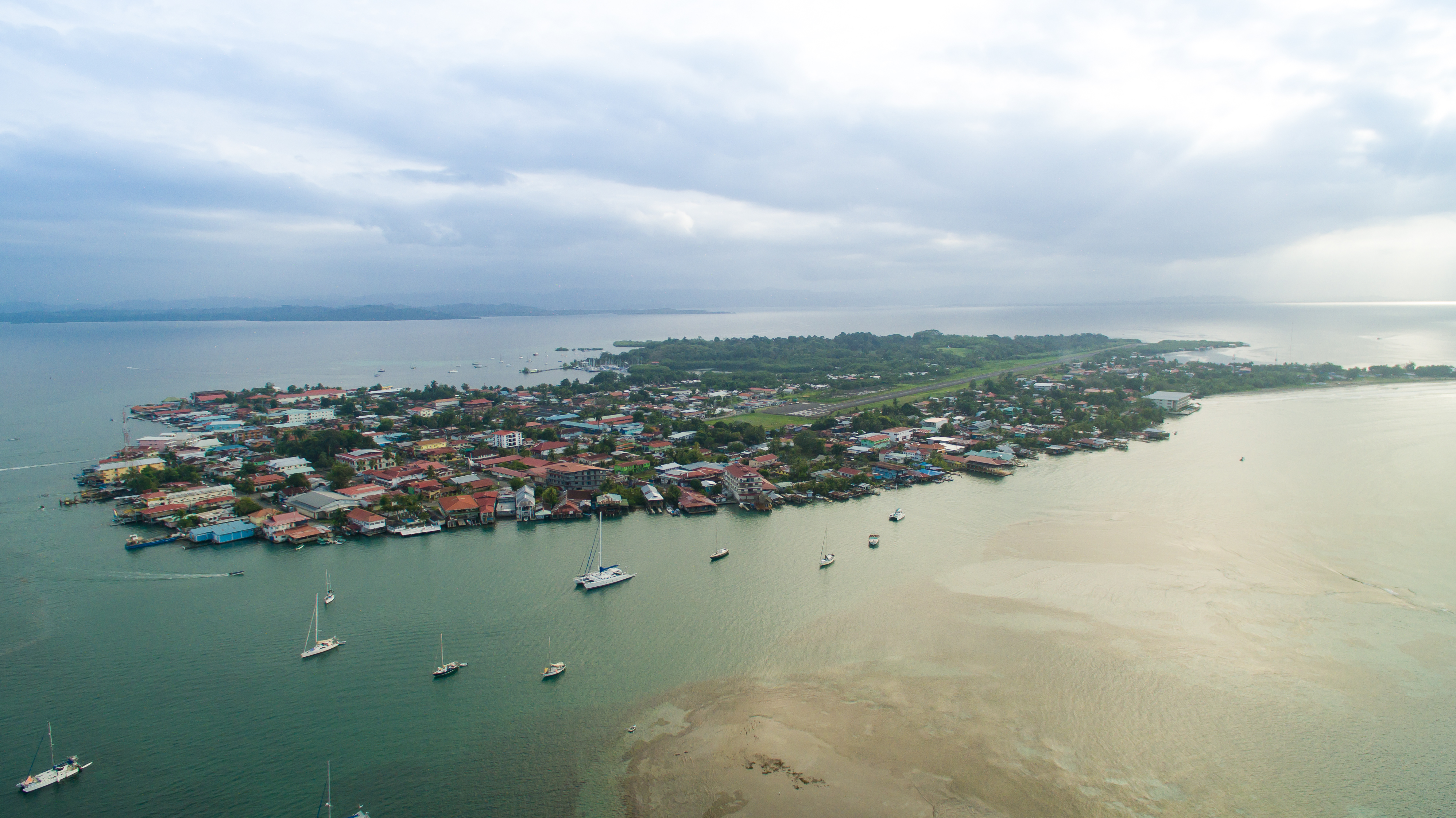 Luftbild von Bocas del Toro.